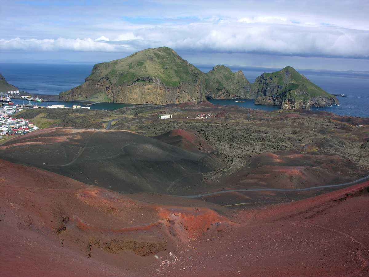 Vestmannaeyjar